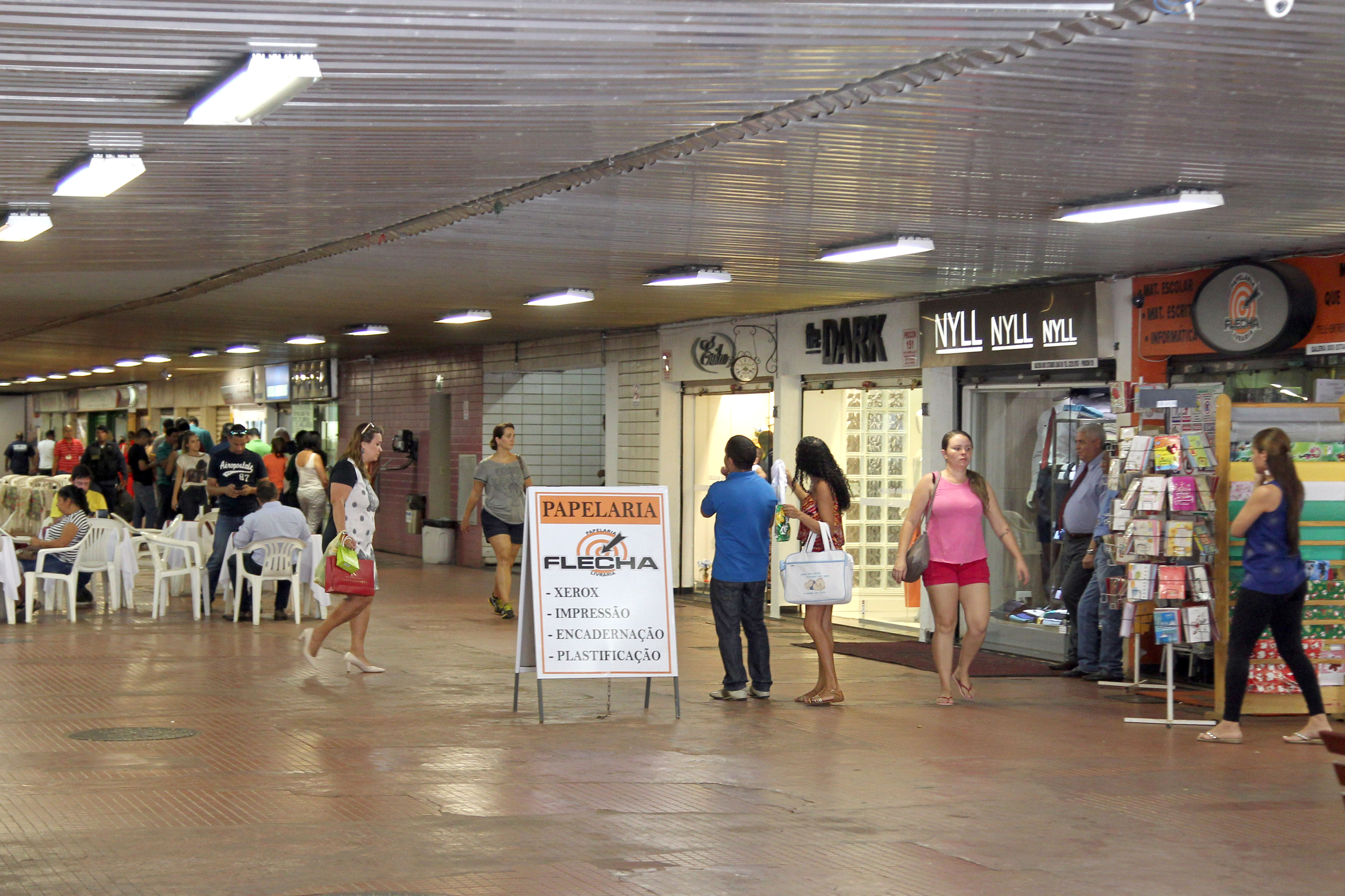 Interior da Galeria dos Estados, situada em Brasília.